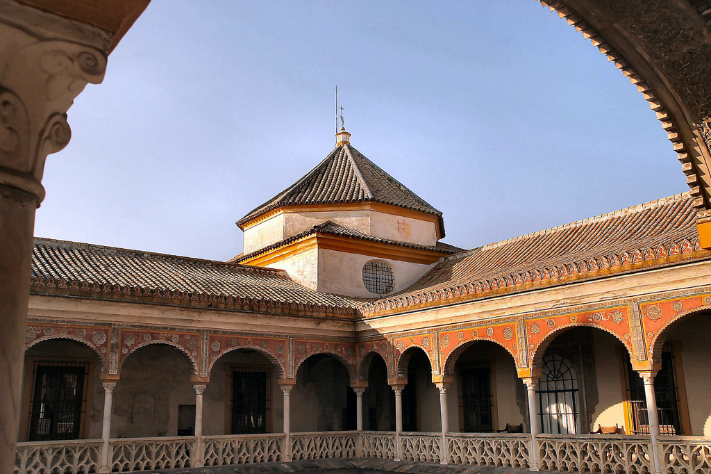 Segunda planta del patio principal de la Casa de Pilatos (Sevilla, España)